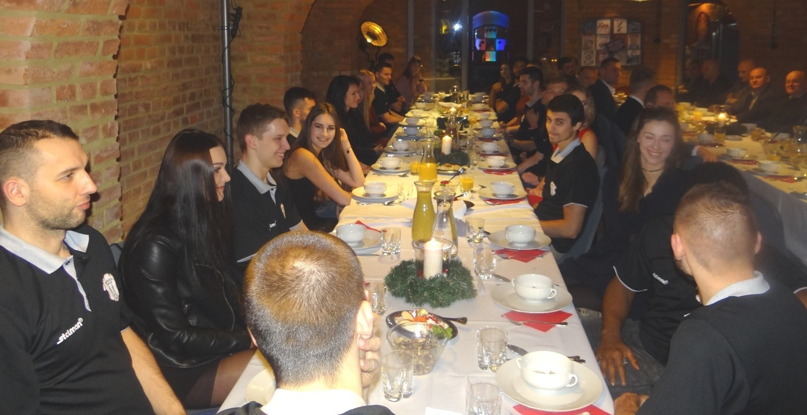 Wigilia w Spójni Stargard (20.12.2018)